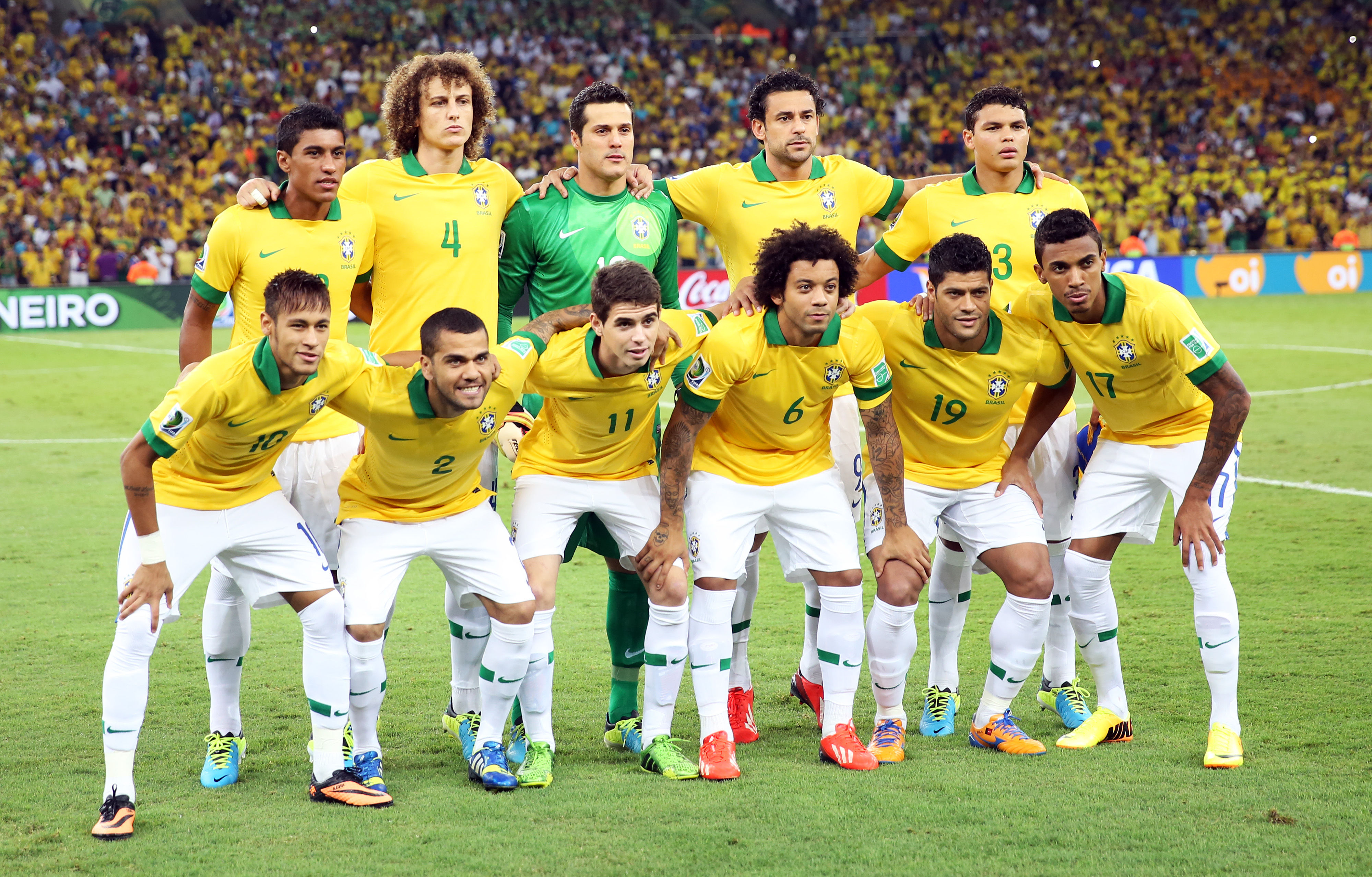 Seleção brasileira de futebol, campeã da Copa das Confederações, 2013